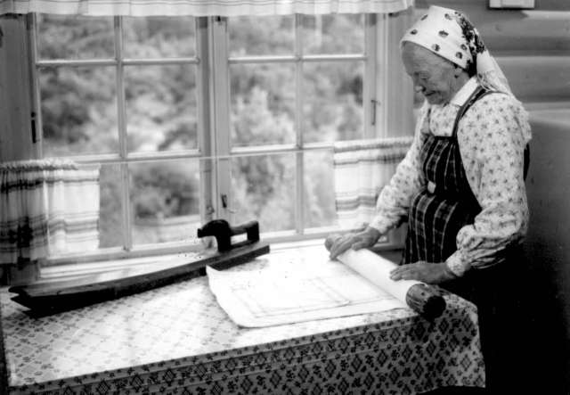 Olivia Dalen, Hol i Hallingdal ruller tøy opp på stokken til mangletreet